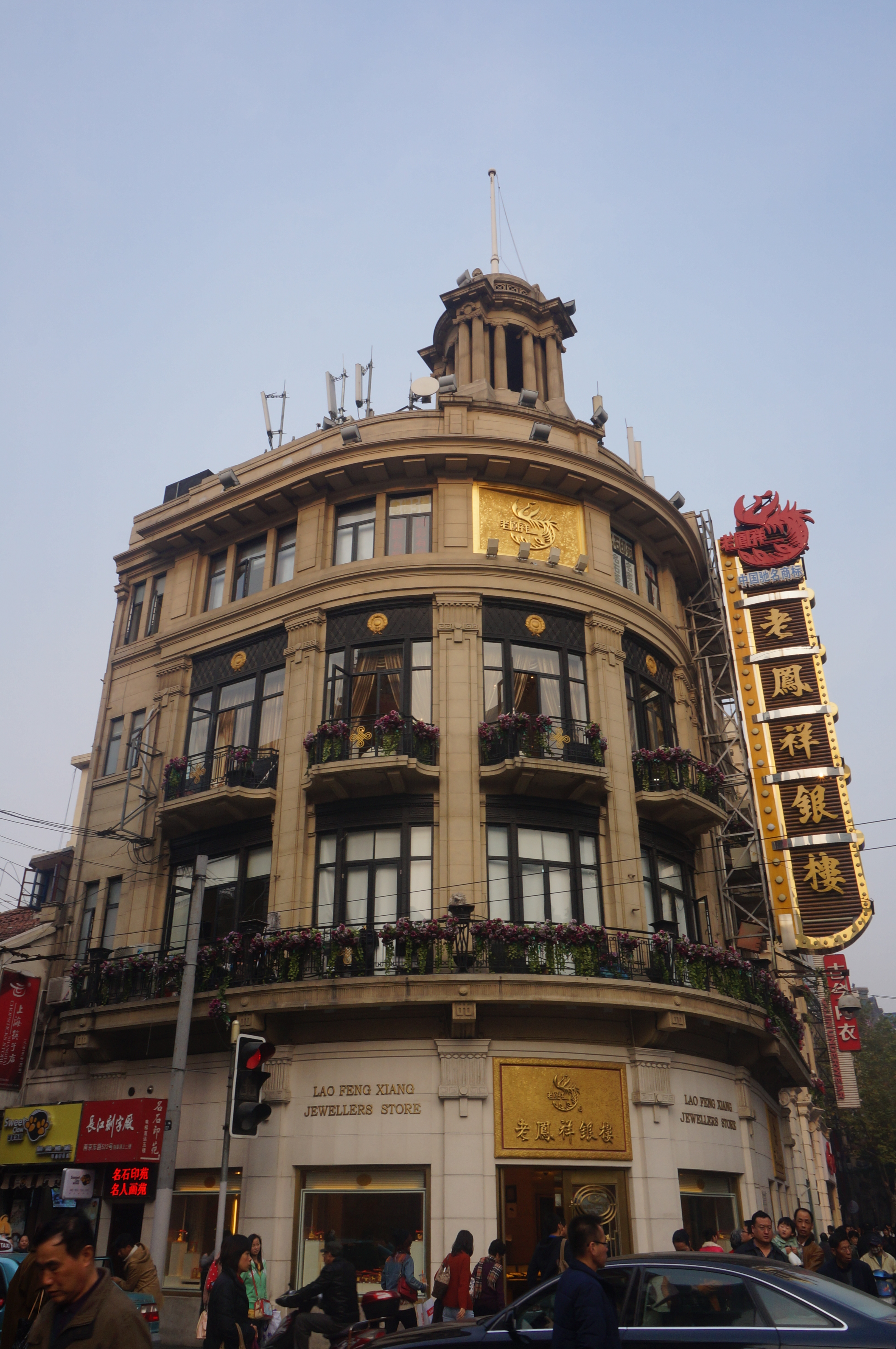 中文（中国大陆）: 于上海南京路上的老凤祥银楼